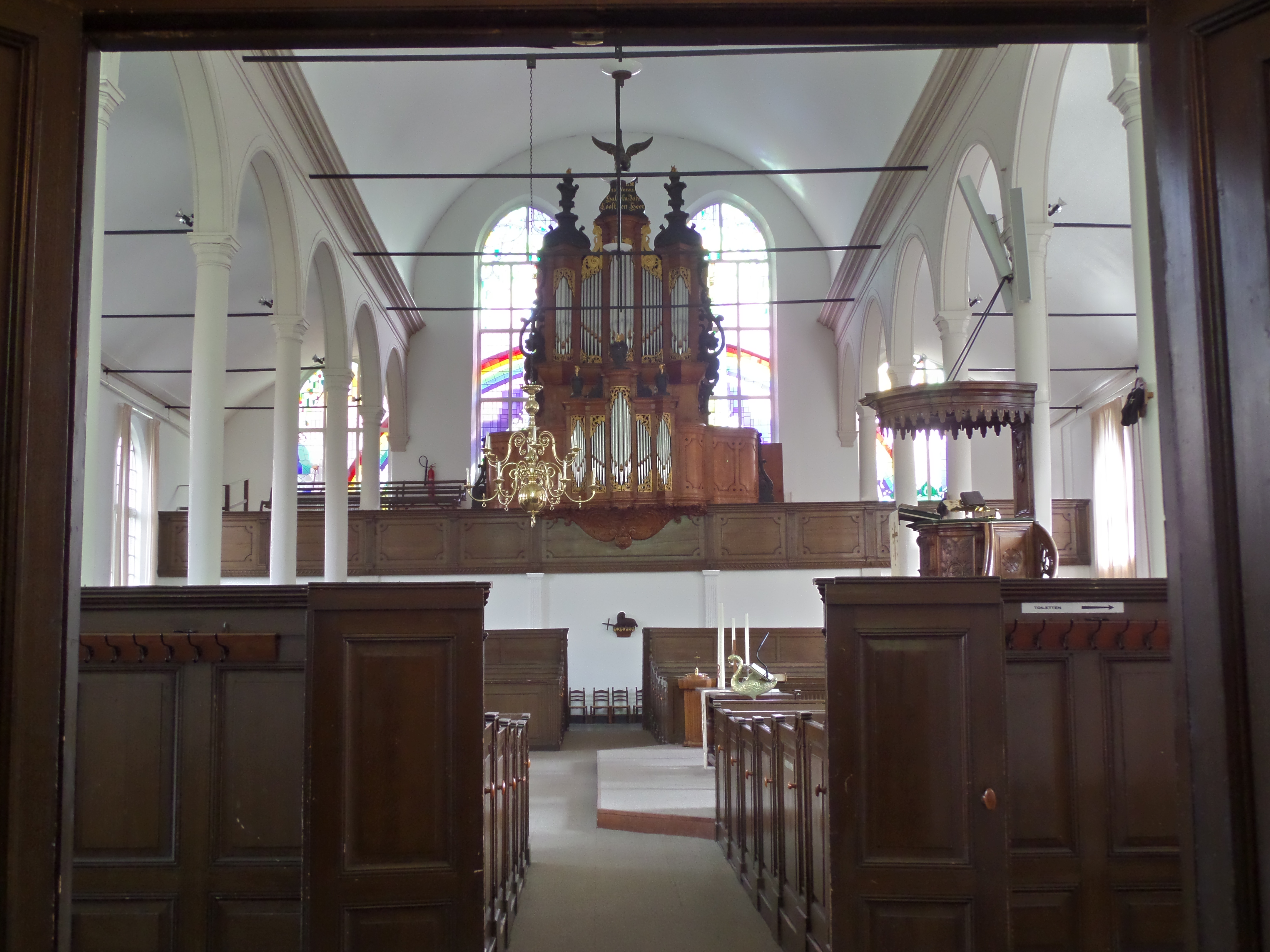 Achter het orgel is de regenboog. Voor de preekstoel staat de zwaan als lezenaar.